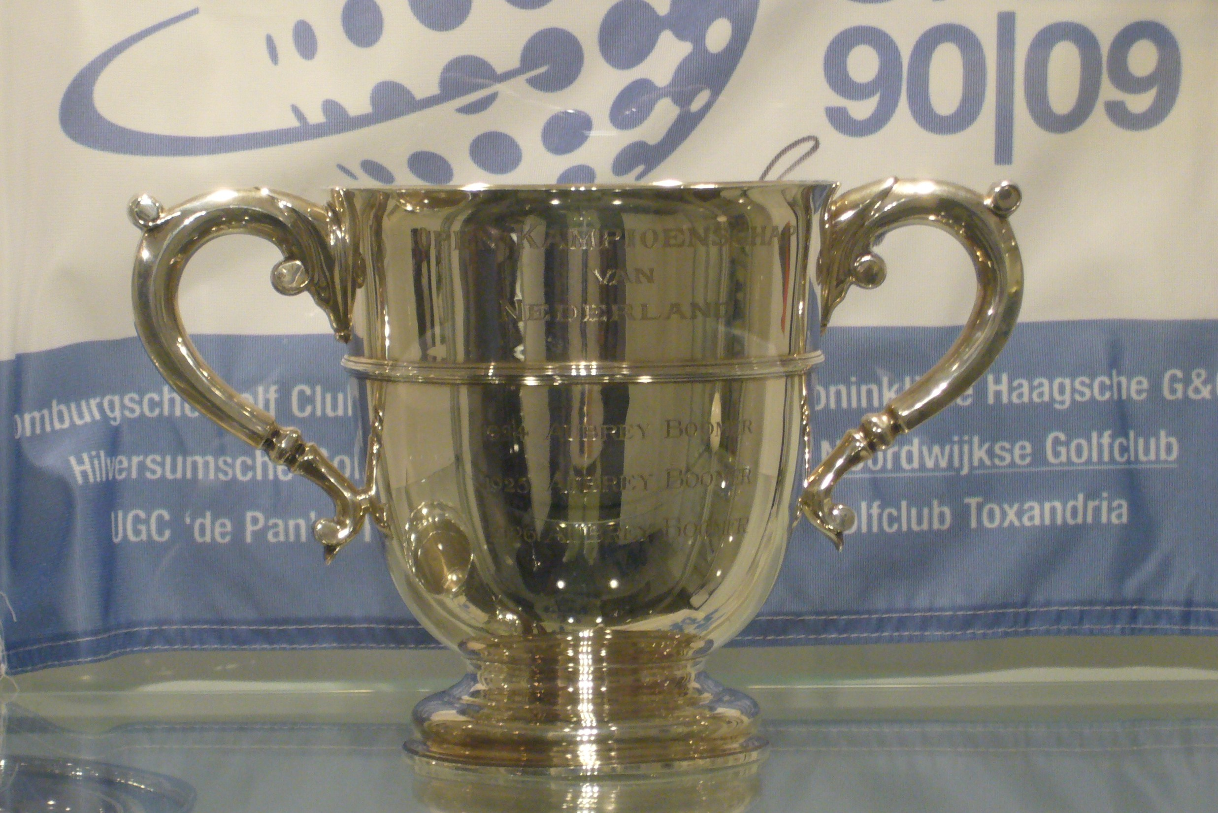 eerste wisselbeker van het Dutch Open, 3x gewonnen door Henry Burrows